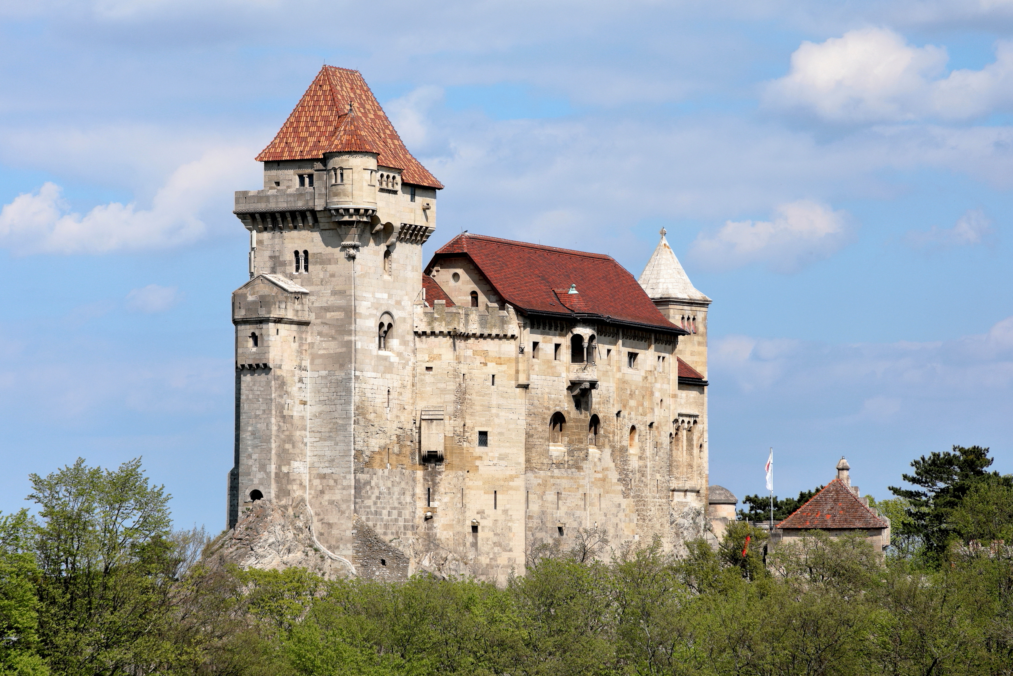 Südwestansicht der Burg Liechtenstein in der niederösterreichischen Marktgemeinde Maria Enzersdorf.Eine weithin sichtbare und hoch aufragende mächtige romanische Burg, die bis ins 17. Jahrhundert mehrfach verändert, erweitert bzw. nach Zerstörungen wiederaufgebaut wurde. Bei der Türkenbelagerung 1683 wurde sie stark beschädigt und war anschließend eine Ruine, die erst ab dem Anfang des 19. Jahrhundert unter Einbeziehung der mittelalterlichen Anlage wiederaufgebaut bzw. rekonstruiert und erweitert wurde.